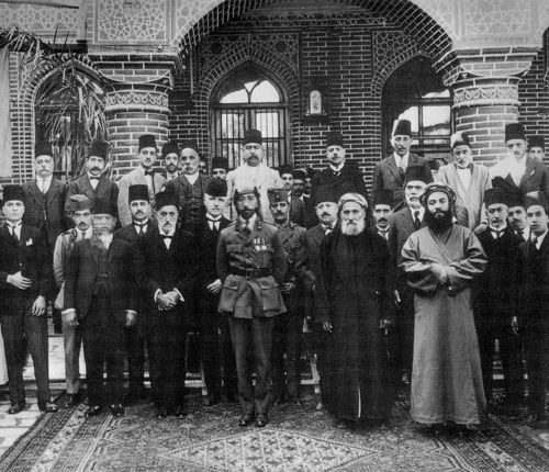 המלך פייסל בביקור הקהילה היהודית בבגדאד בשנת 1925 יחד עם הרב ששון כדורי, הרב עזרא דנגור, רוסתום חידר, מנחם צאלח דניאל ונכבדי הקהילה